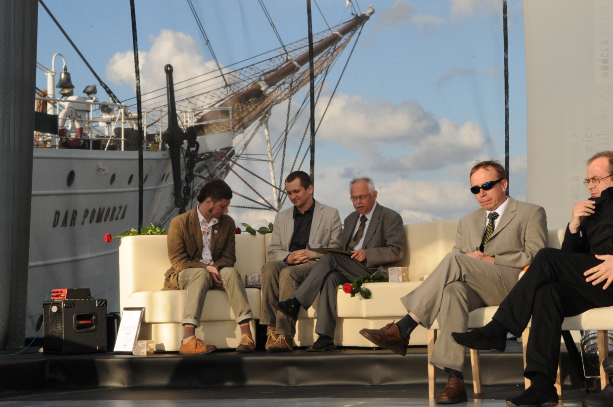 Laureaci NLG A.D. 2008